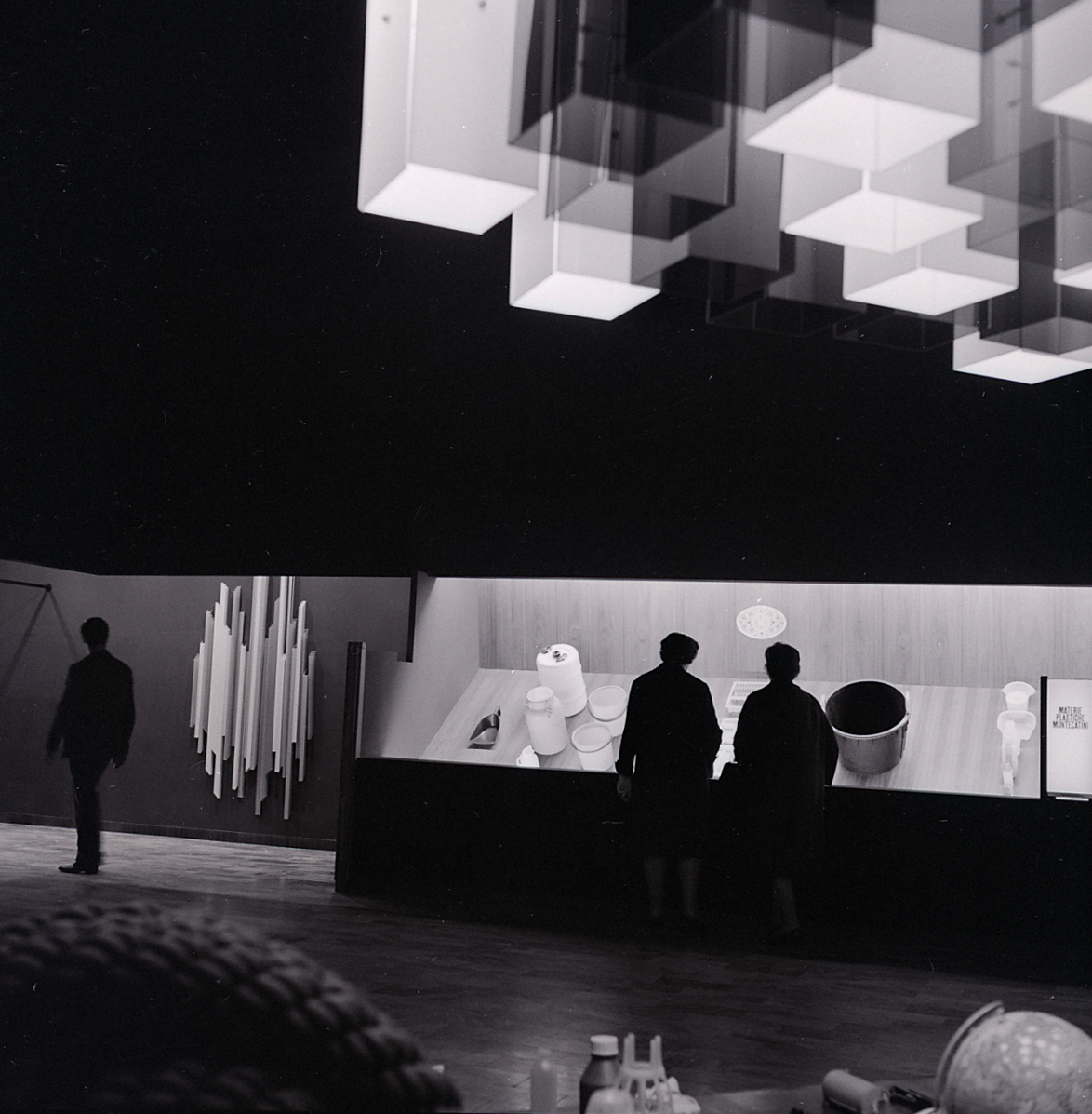 Milano. Fiera di Milano del 1954. Allestimento dello studio di architettura BBPR per il padiglione elastomeri della società Montecatini. Servizio fotografico : Milano, 1961 / Paolo Monti. - Buste: 1, Fototipi: 19 : Negativo b/n, gelatina bromuro d'argento/ pellicola ; 6x6. - ((Serie costituita da 19 negativi identificati con i nn.: 21508-21528. Sulla busta manoscritto: "Montecatini/ Fiera 1961". La suddetta serie è contenuta nella scatola identificata con la numerazione 21358/21558. Sulla scatola manoscritto con pennarello nero: "Fiere/ Italia '61". - Occasione: Documentazione dell'installazione effettuata dagli architetti BBPR per il padiglione dela società Montecatini allestita presso la Fiera del 1961 a Milano. - Fonte: Agenda di Paolo Monti: Monti/ 2/ 6 giugno 1964 - 31 marzo 1966/ 8194-12420 (1964-1966), presso Archivio Paolo Monti